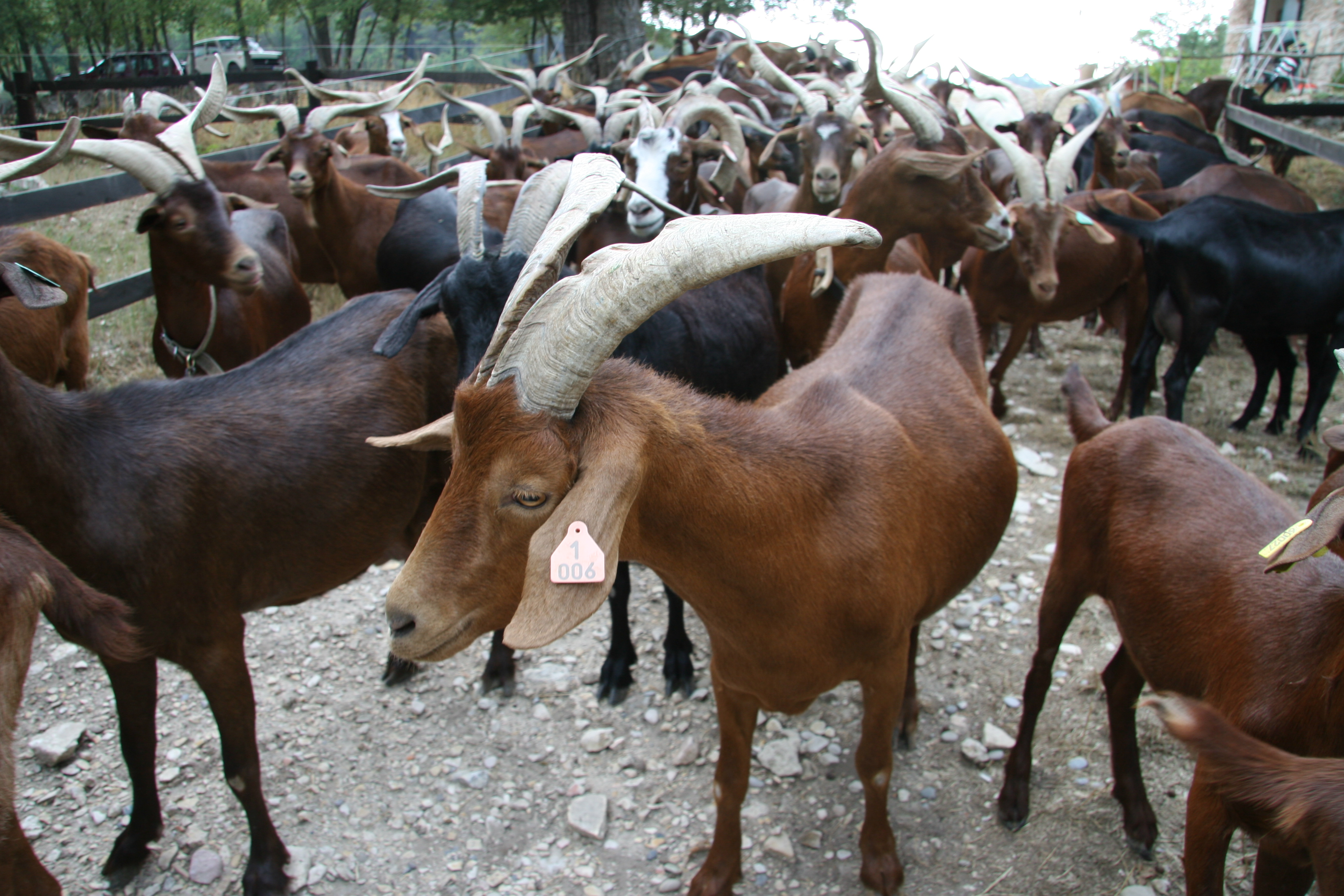 Chèvres Rove dans les Bouche-du-Rhône